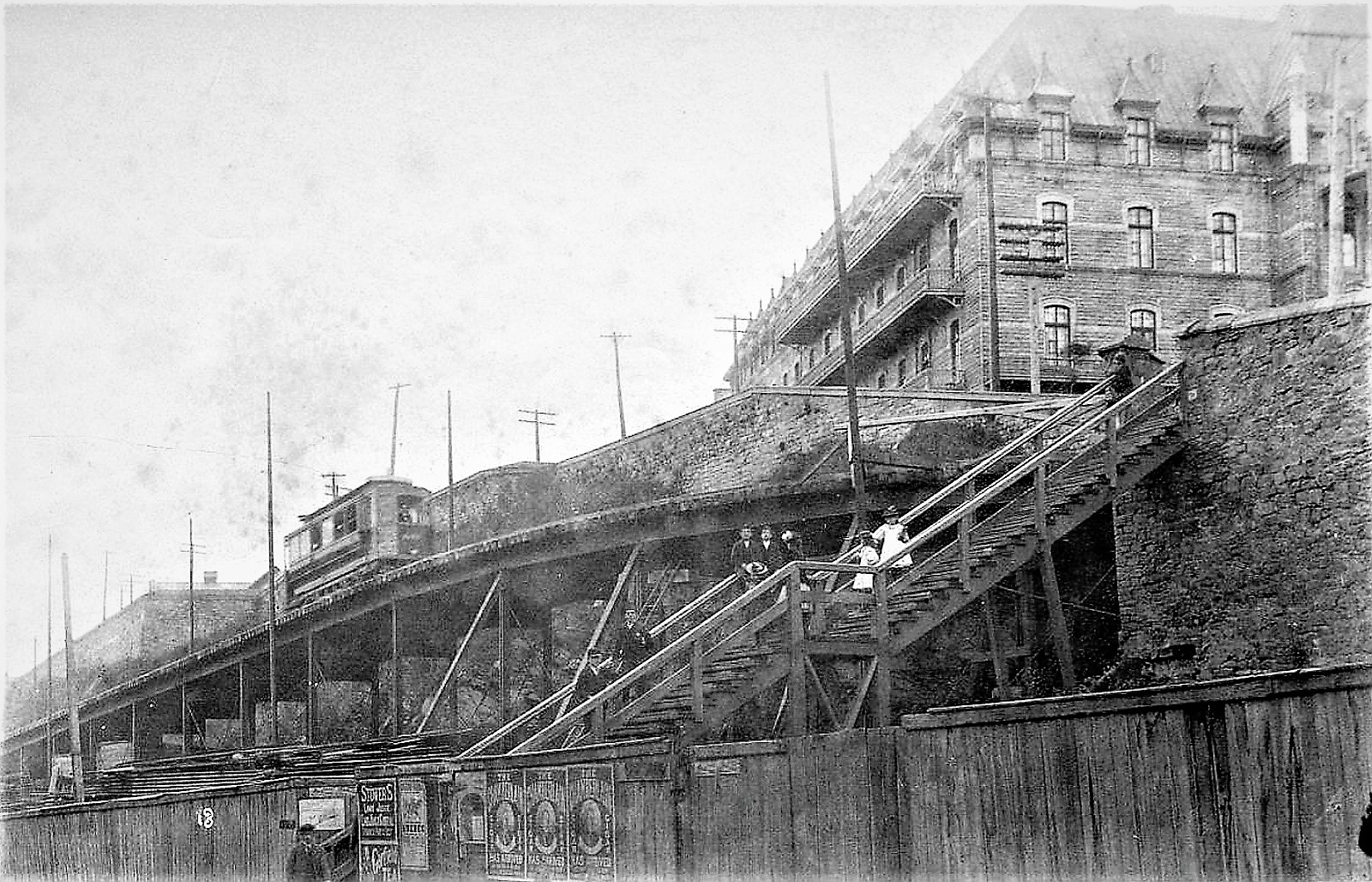 Vue du Viaduc ferroviaire (1898) situé à l'emplacement actuel de la côte Dinan. On aperçoit le pavillon d'Aiguillon de l'Hôtel-Dieu à l'arrière-plan. En 1898, le viaduc pour le tramway relie la Basse-Ville à la Haute-Ville de Québec, de la côte Dinan à la côte du Palais. « Au XIXe siècle, seulement quatre côtes relient la basse-ville à la haute-ville: les côtes de la Montagne, de la Canoterie, Dambourgès et du Palais. Toutefois, elles sont trop abruptes pour permettre la montée des tramways. C'est pourquoi, en 1897, on construit un viaduc à la pente très douce, reliant la rue Saint-Paul au sommet de la côte du Palais, près de l'Hôtel-Dieu. C'est la côte Dinan. Il s'agit d'un plan incliné reposant sur des chevalets. En 1948, lorsqu'on abandonne les tramways au profit des autobus, ce viaduc est réaménagé pour les véhicules automobiles. Encore aujourd'hui, à partir de la basse-ville, on aperçoit toujours les piliers de béton qui la supportent et qui ont remplacé les chevalets d'acier originels. » − Société historique de Québec